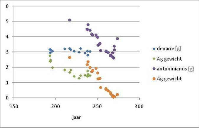 ontwikkelingen in het muntstelsel van het Romeinse Rijk is de crisis van de 3e eeuew